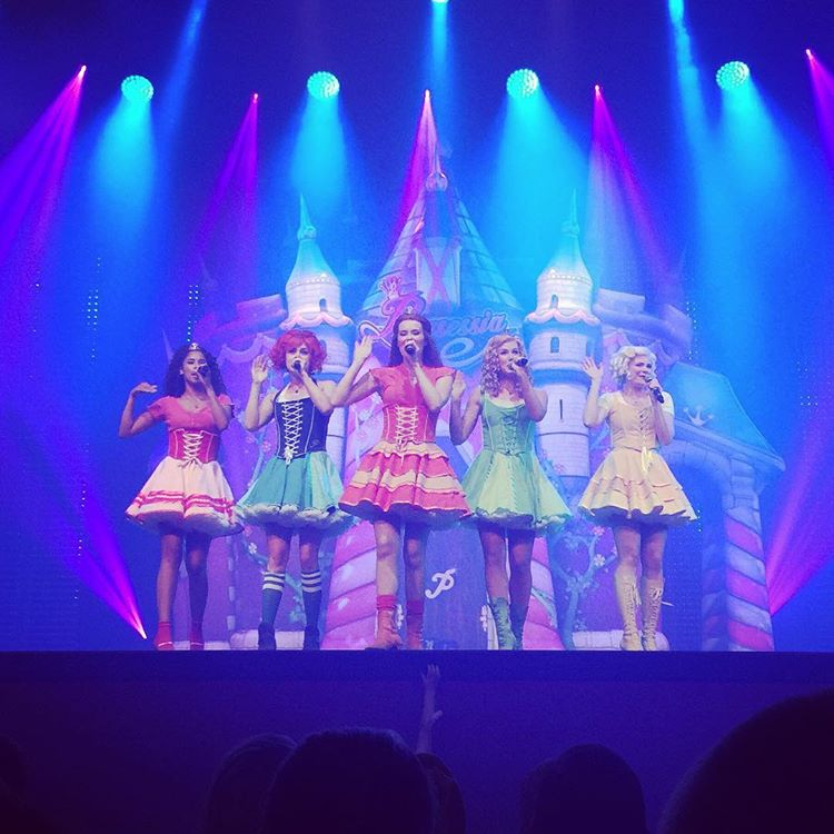 Prinsessia tijdens hun park show in juli 2016